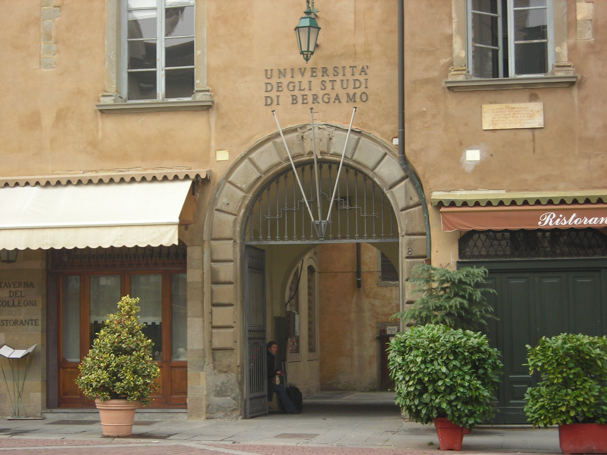 Università degli Studi di Bergamo, Piazza Vecchia building, in Bergamo, Lombardia, Italy.